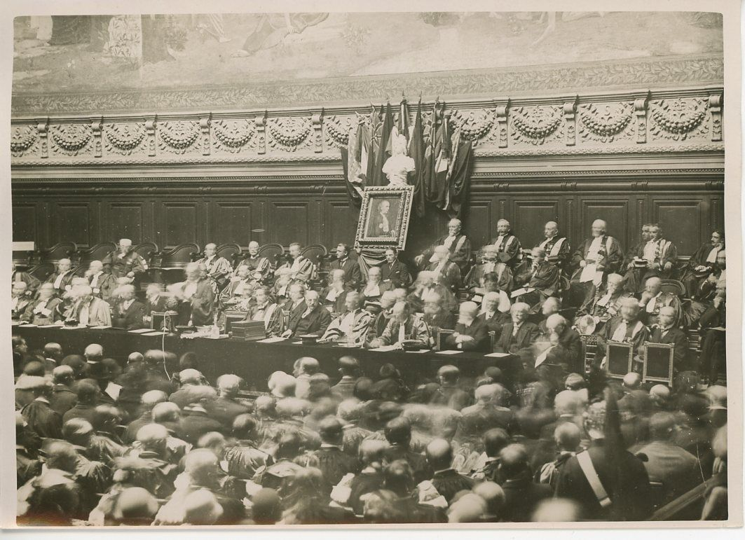 Séance à l'académie de Paris